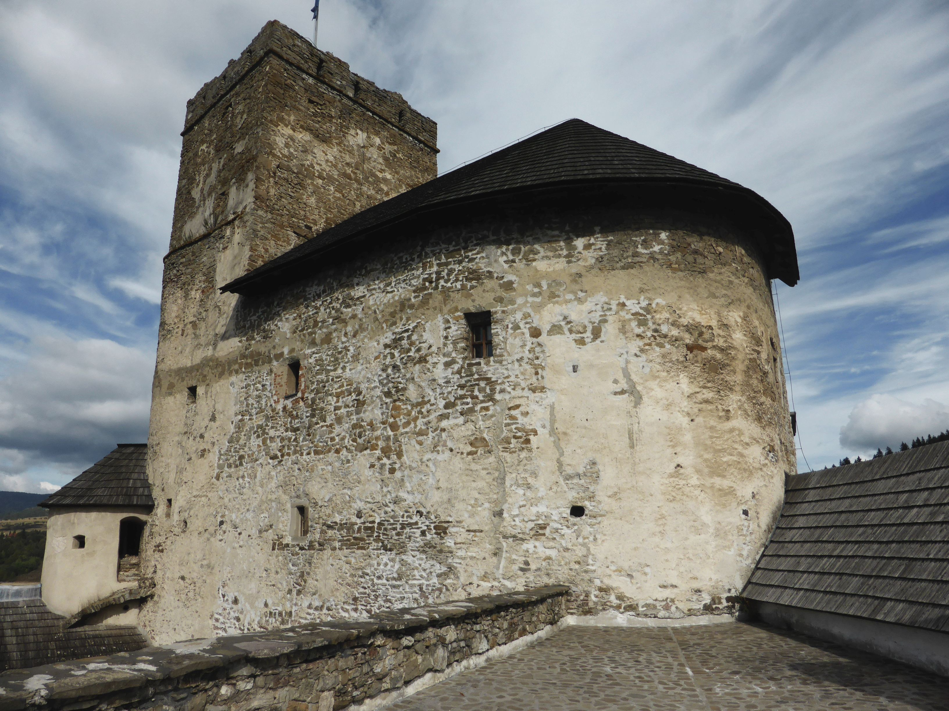 Niedzica Castle - Bergfried mit Rundbastion